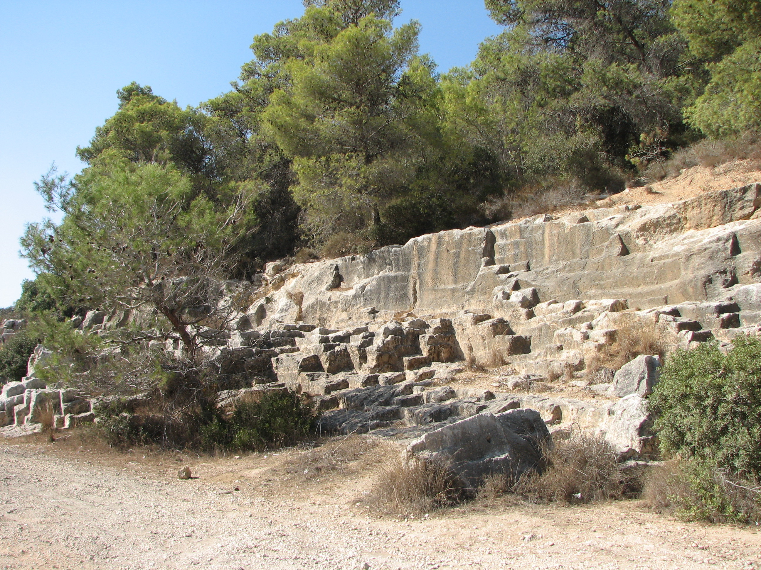 Kdumim Quarries - Old stone quarry on the Carmel Mountain מחצבות קדומים - מחצבת אבן קדומה על הר הכרמל מבט כללי על המחצבה מכביש 721